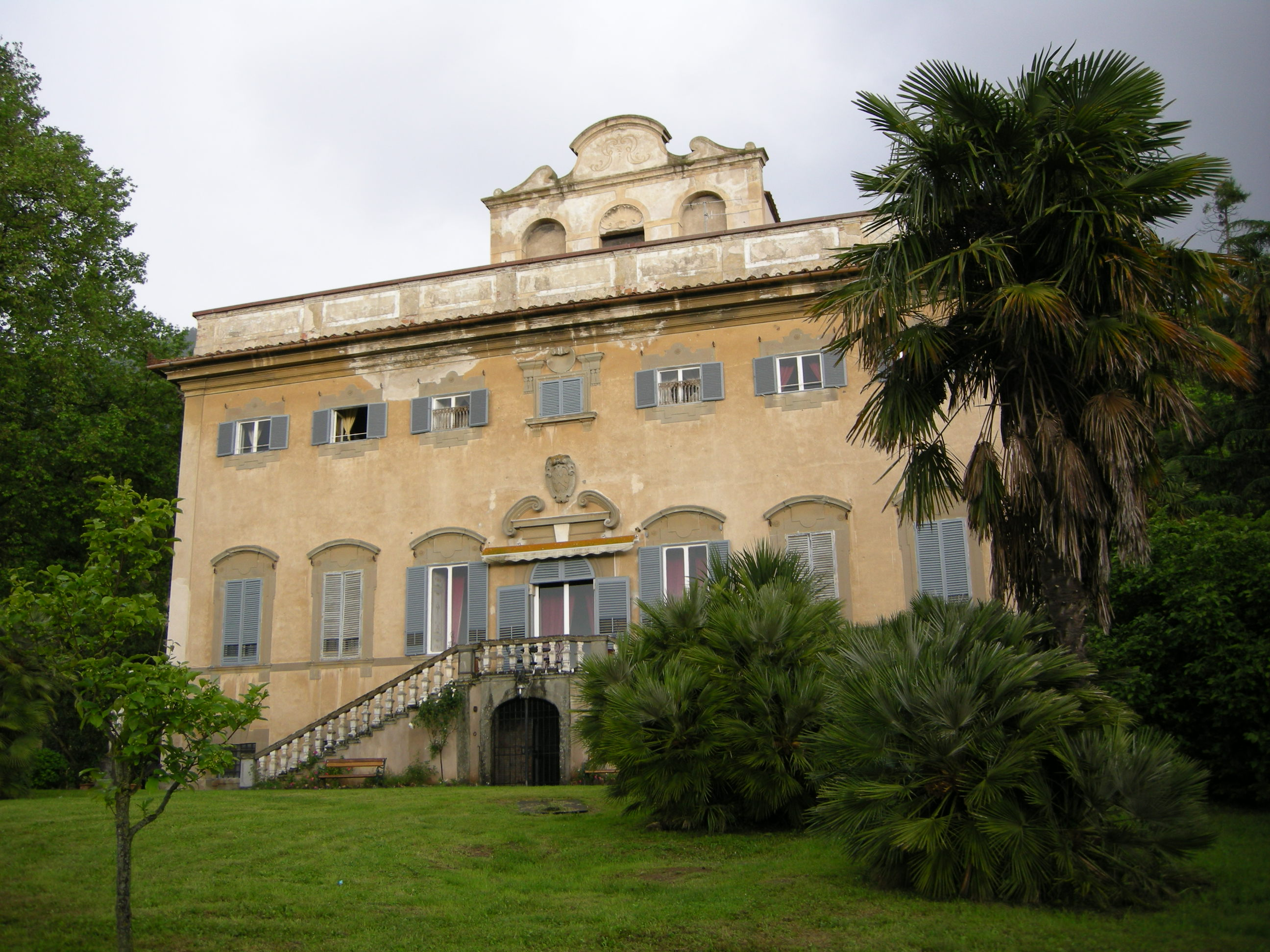 Villa di corliano 09.1